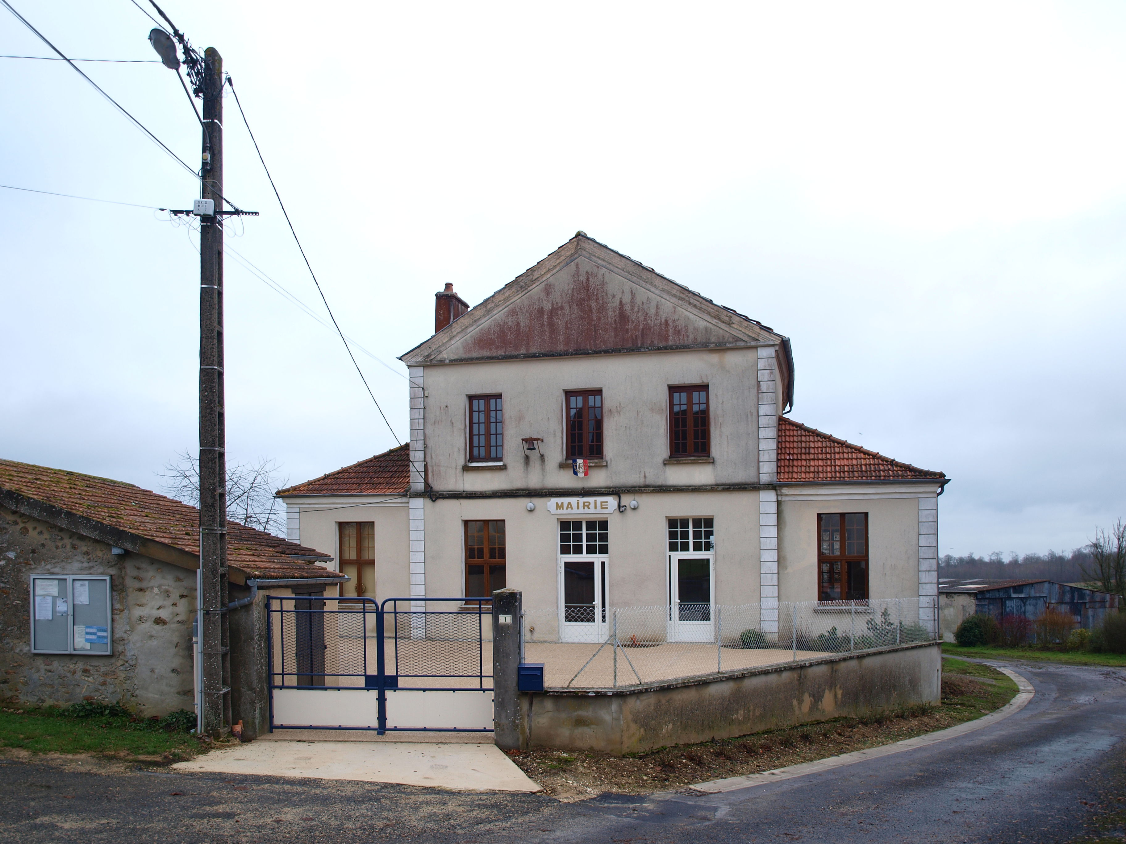 Fontenelle-en-Brie (Aisne, France) ; mairie.